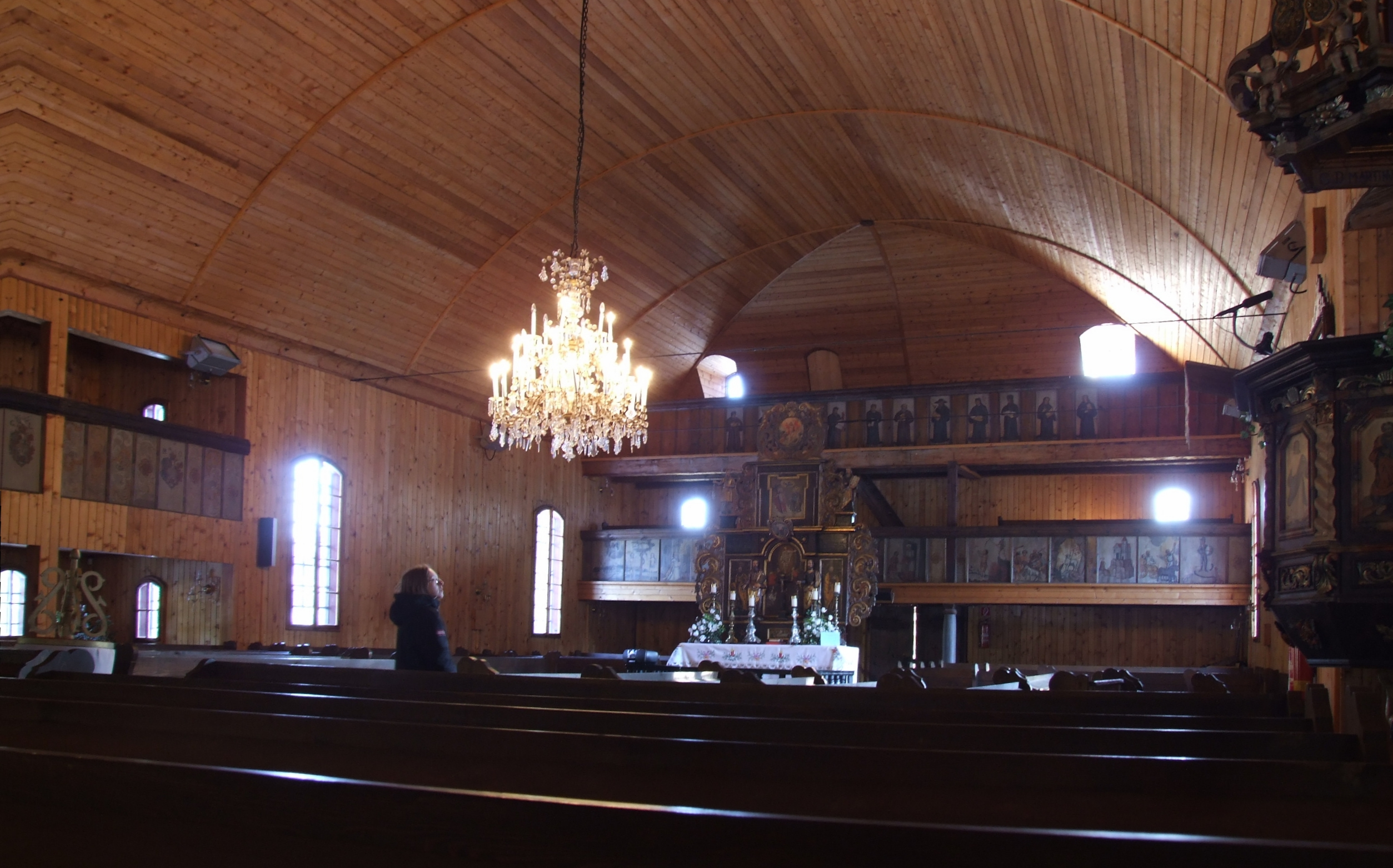 Artikulárny kostol - Svätý Kríž. Interior